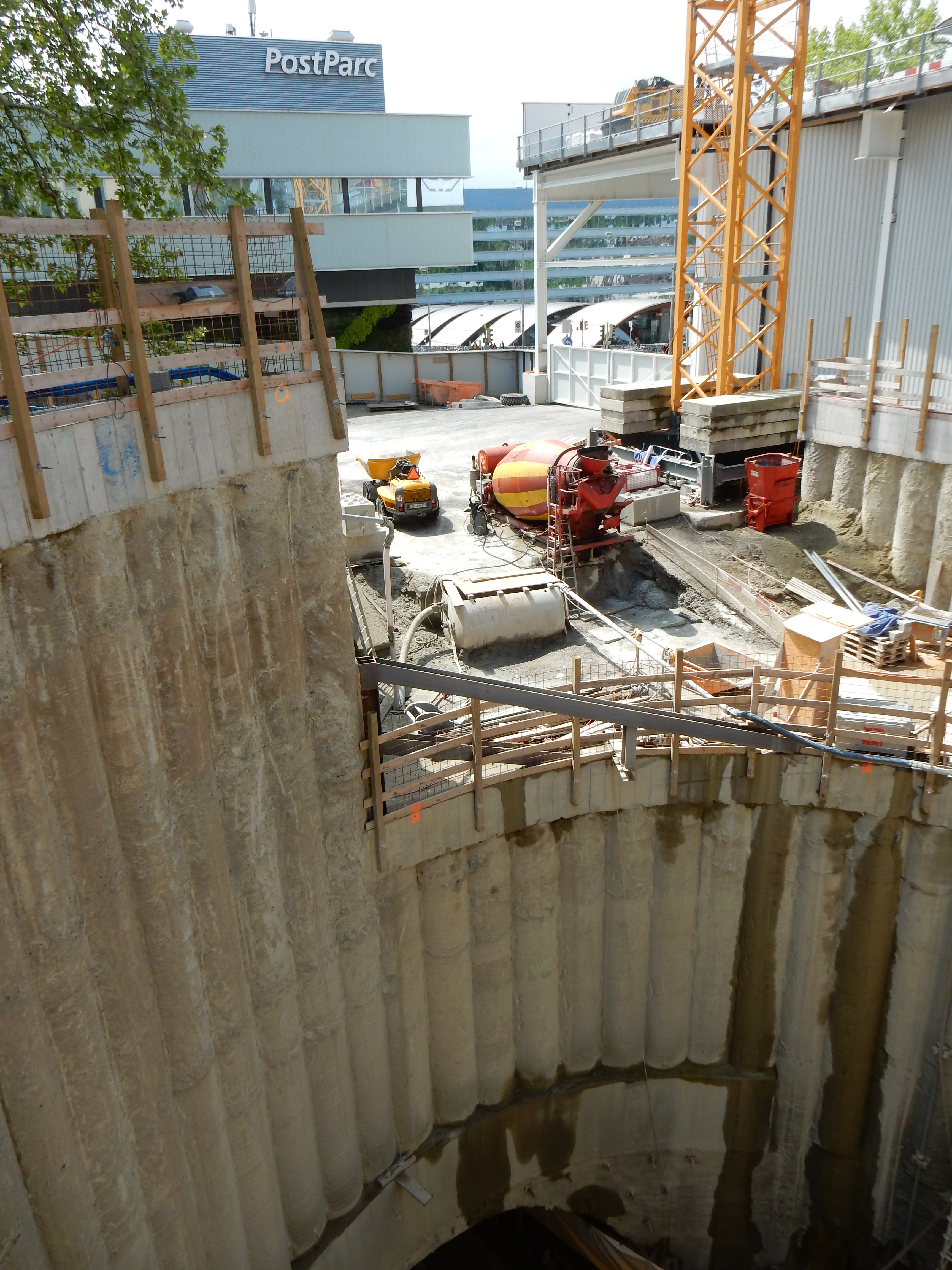 Bern Bahnhof Baustelle Grosse Schanze: neuer Fussgängerzugang